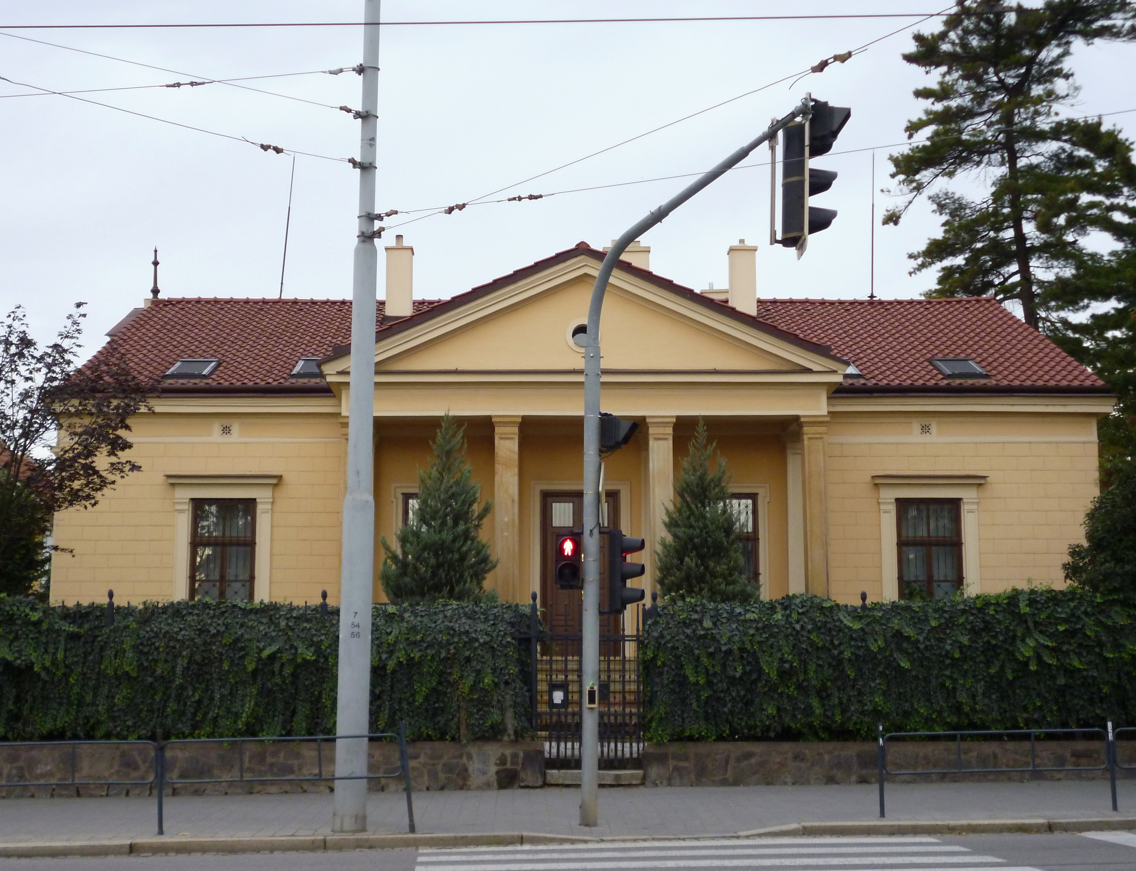 Vila, z toho jen: průčelí (Brno), Královo Pole, Riegrova 903/2, Palackého 2822/101, Brno